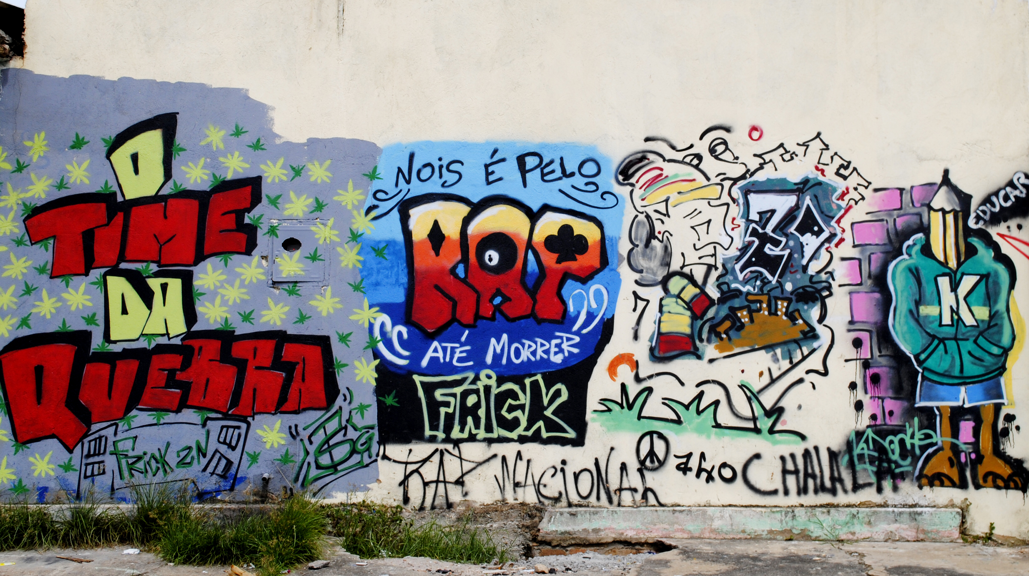 Grafito